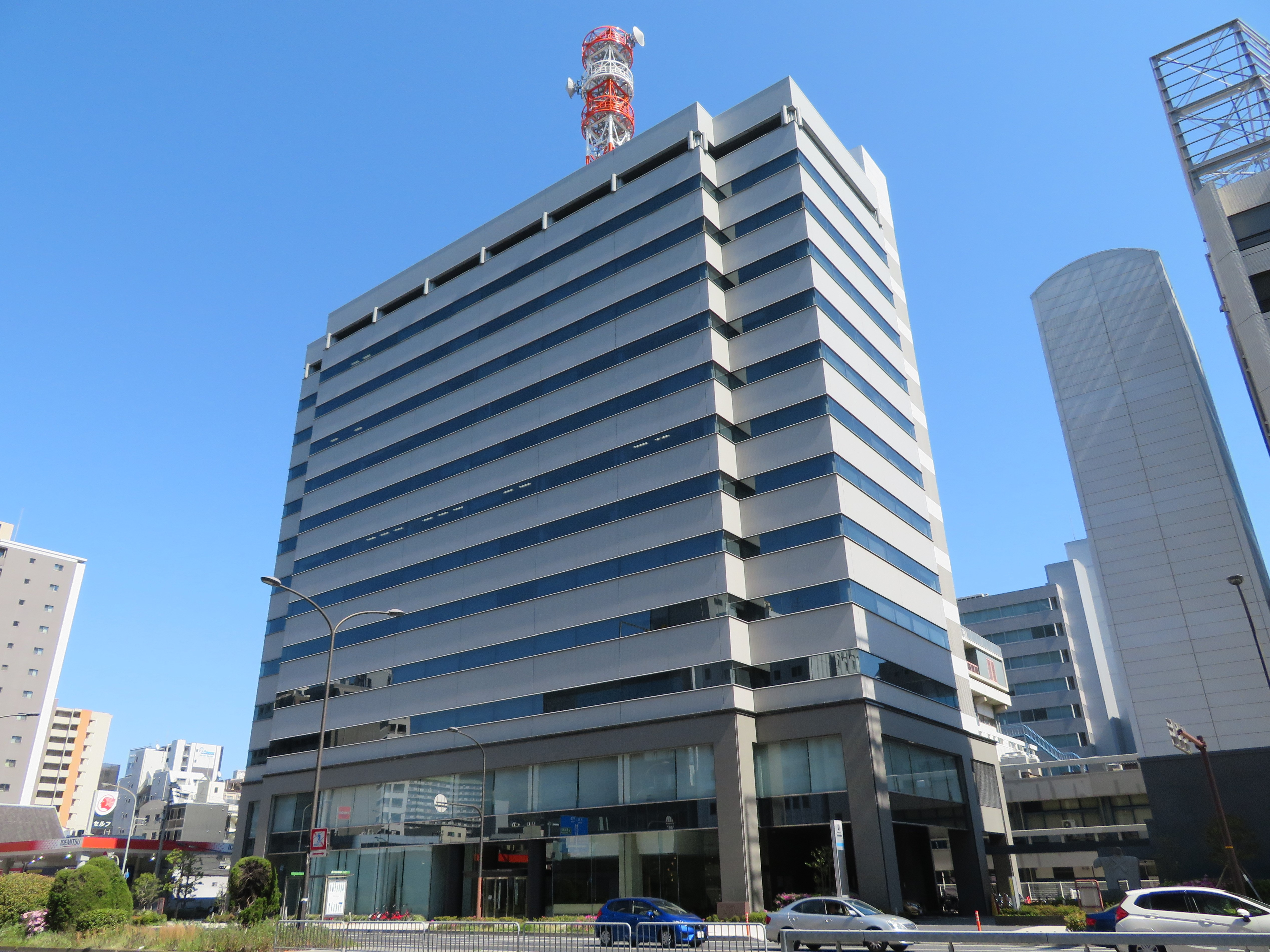 アーバンエース三宮ビル